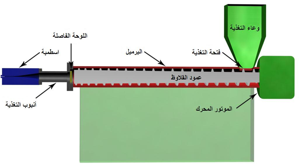 عربي: مقطع جانبي لماكينة بثق بلاستيك